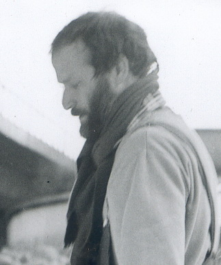 Aleš Kuneš, portrét, 1990